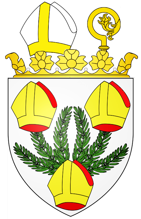 Abbaye de Fécamp, Blason